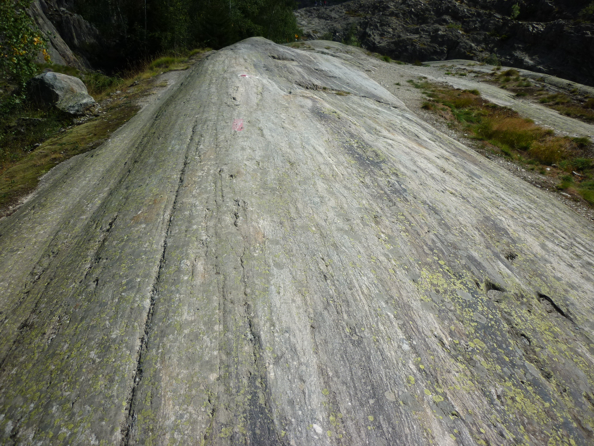 Gletscherschliff beim Aletschgletscher, Schweiz